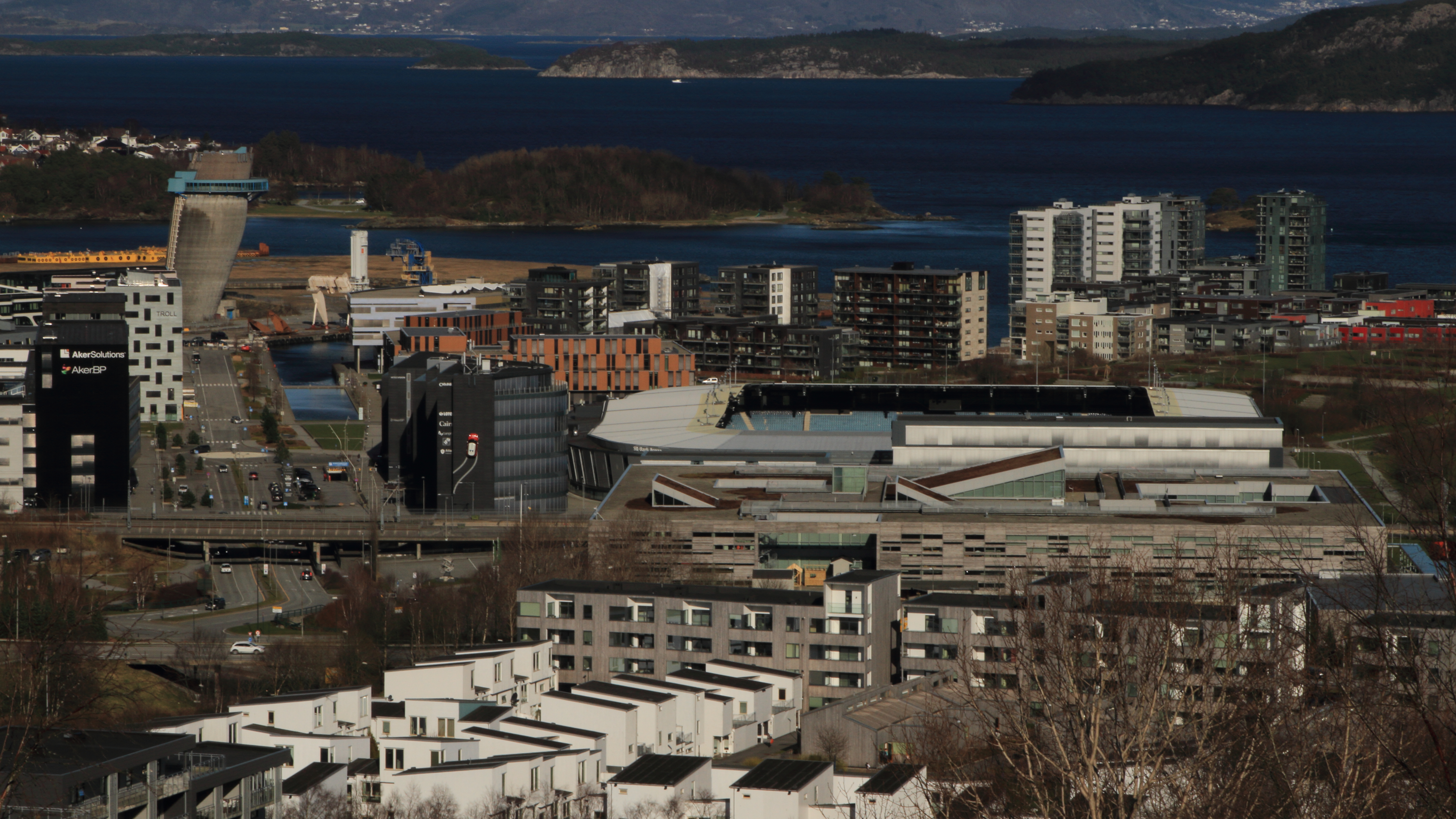 Hinnavågen med Viking stadion